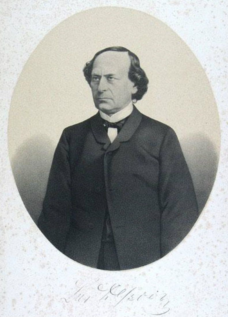 Ludwig Dessoir (* 15. Dezember 1810 in Posen; † 30. Dezember 1874 in Berlin), deutscher Schauspieler